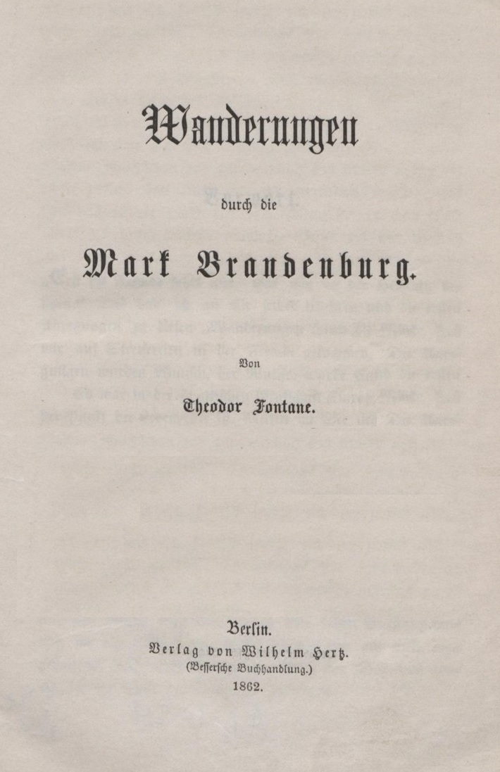 Theodor Fontane, Wanderungen durch die Mark Brandenburg, Band 1, Berlin 1862, Titelseite